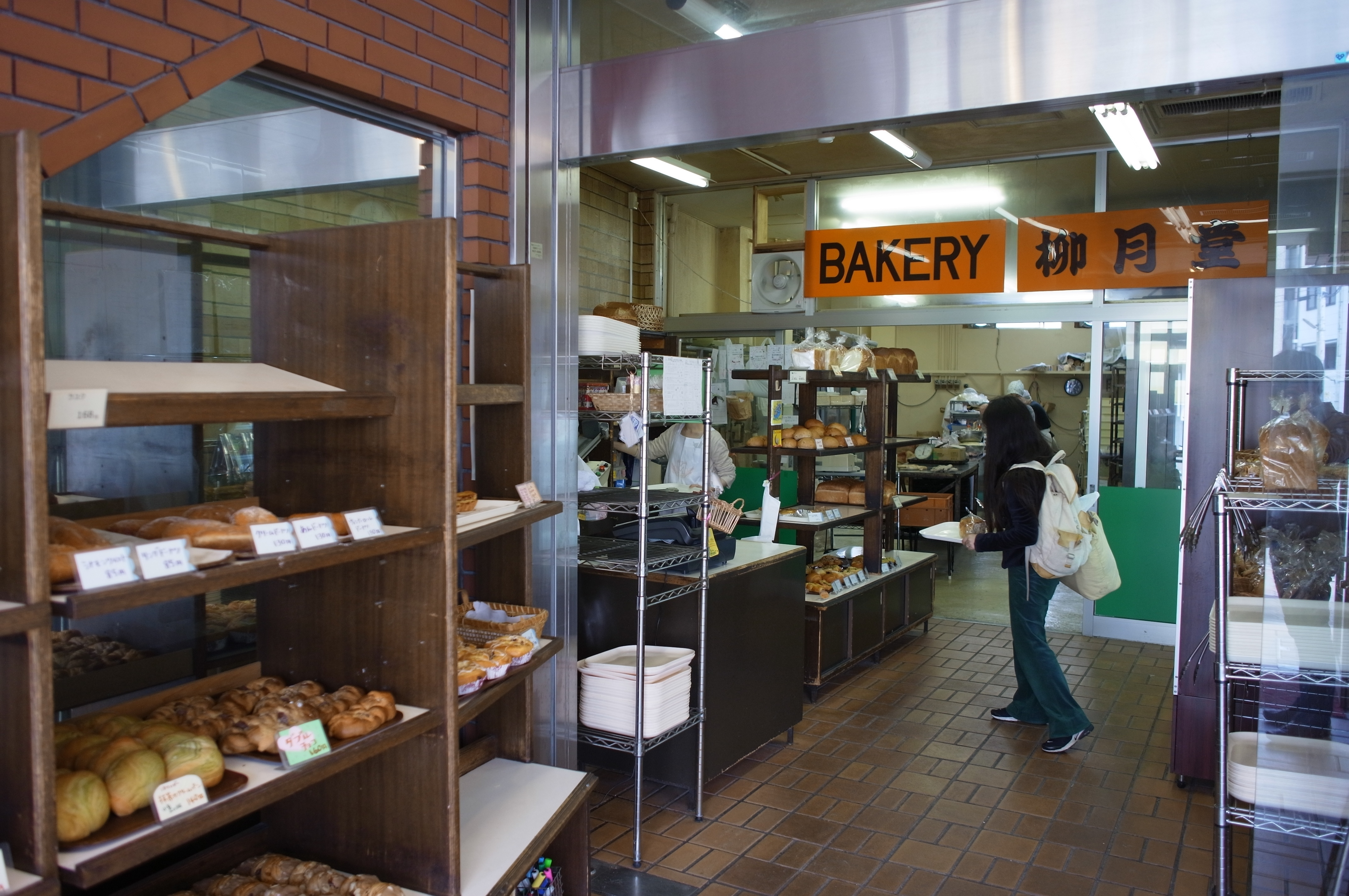 R0012490